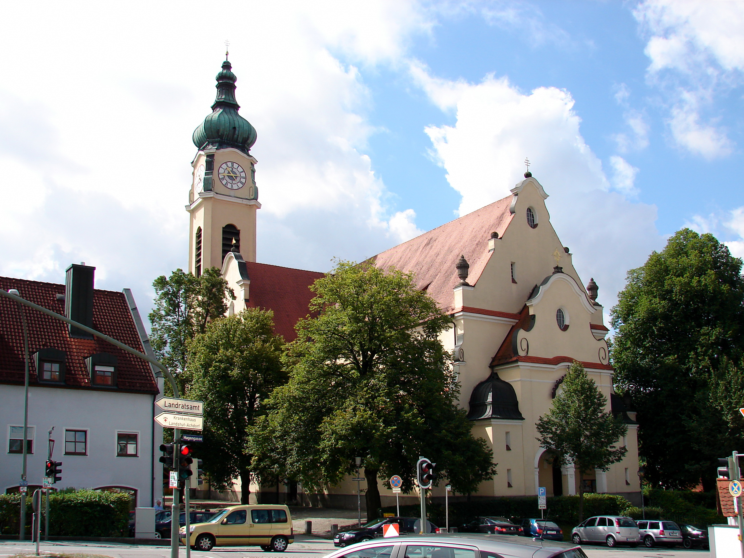 Neubarock, 1910-12 erbaut nach Plänen des Regensburger Architekten Heinrich Hauberrisser; mit Ausstattung